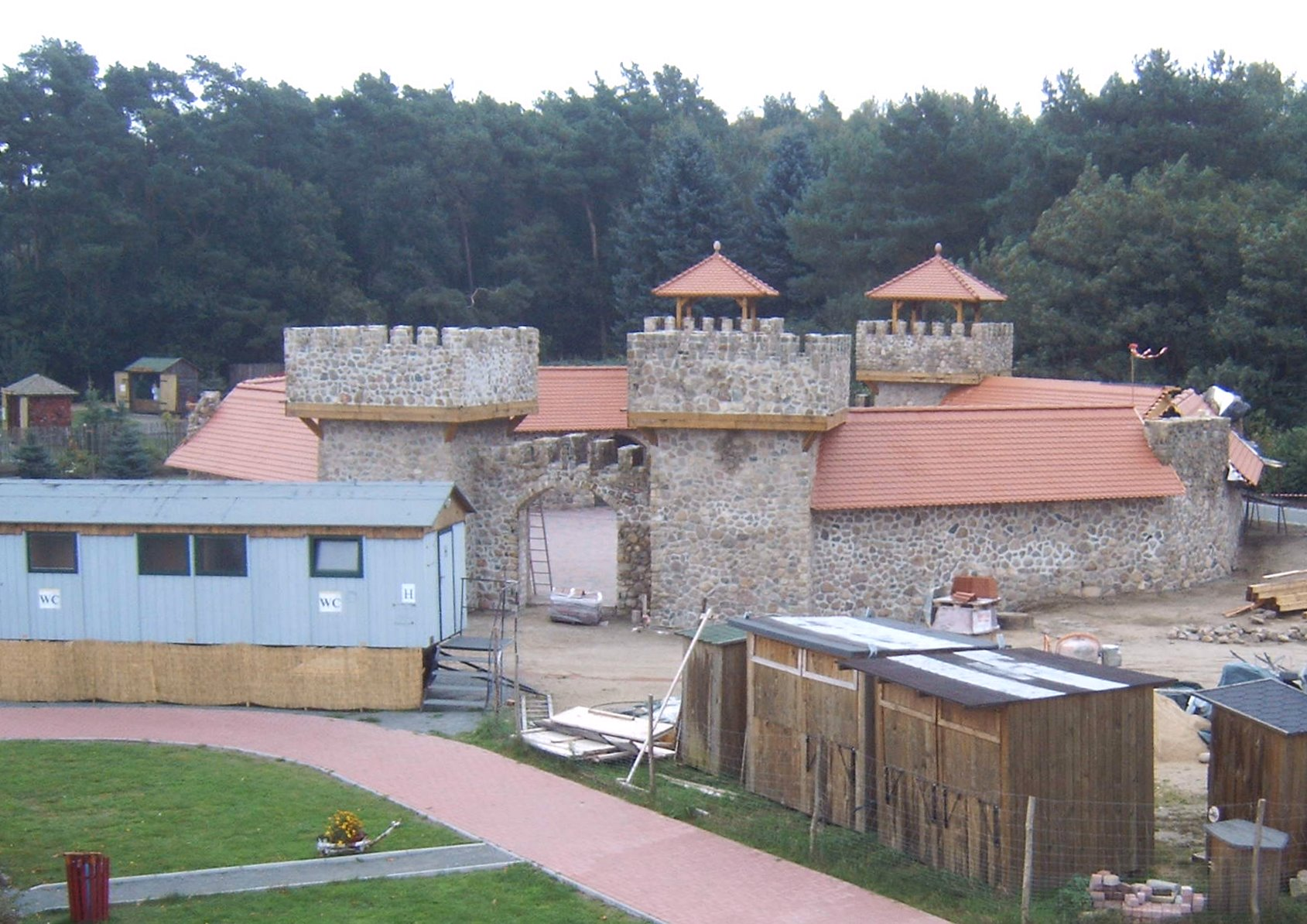 Burg im Märchenpark Salzwedel, Sachsen-Anhalt, Deutschland